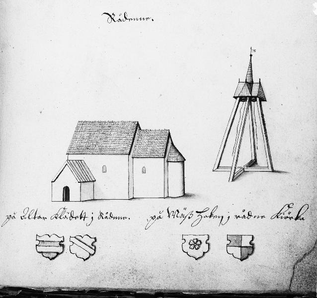 Kyrkan och klockstapeln från sydöst, dessutom vapensköldar från altarkläde och mässhake. Foto efter teckning ur Peringskiölds Monumenta. Kategori: (01) ExteriörerKyrkan och klockstapeln från sydöst, dessutom vapensköldar från altarkläde och mässhake. Foto efter teckning ur Peringskiölds Monumenta.